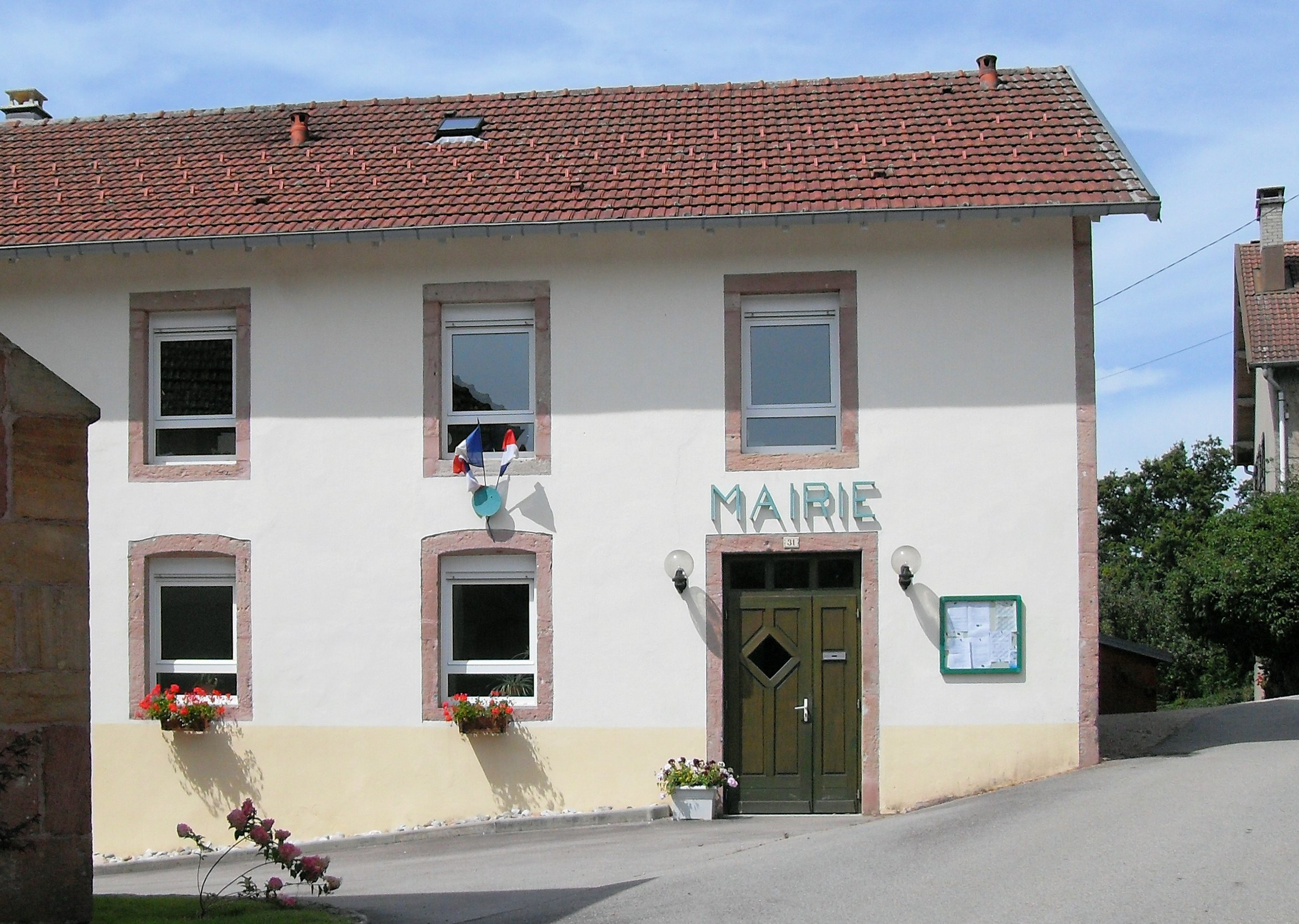 La maire de Rehaupal